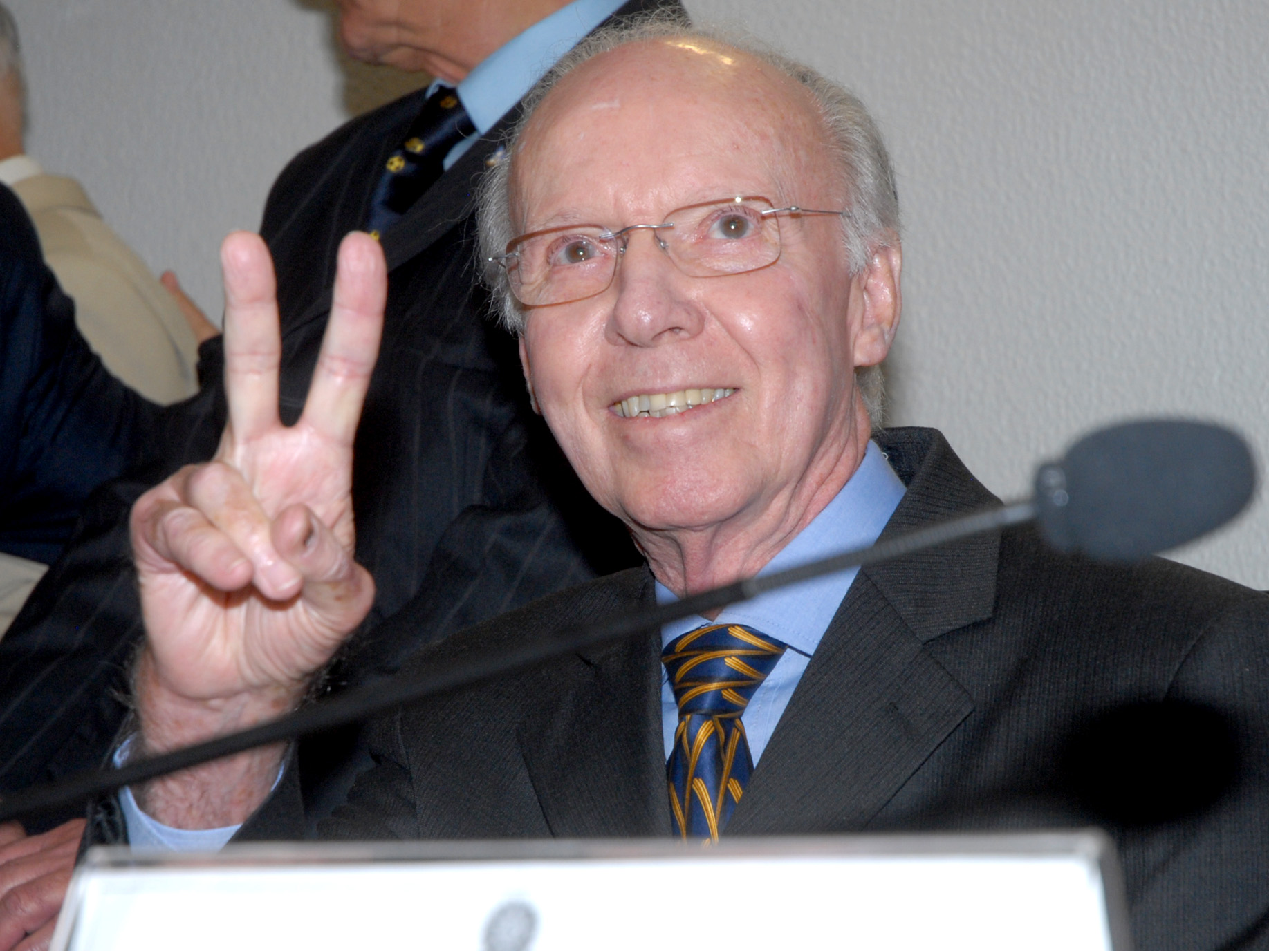 Brasília - O ex-jogador da seleção brasileira de futebol Zagallo participa de audiência publica na Comissão de Educação, Cultura e Esporte do Senado, em comemoração aos 50 anos da conquista da Copa do Mundo de 1958